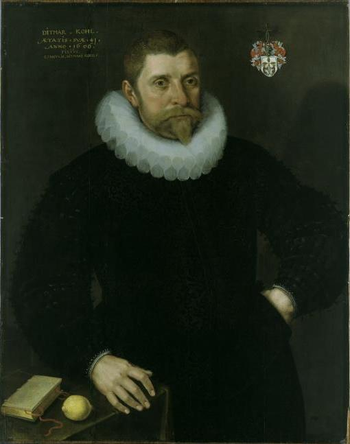 Ditmar Koel (auch Ditmar Kohl) (1565–1628), 1606 von David Kindt